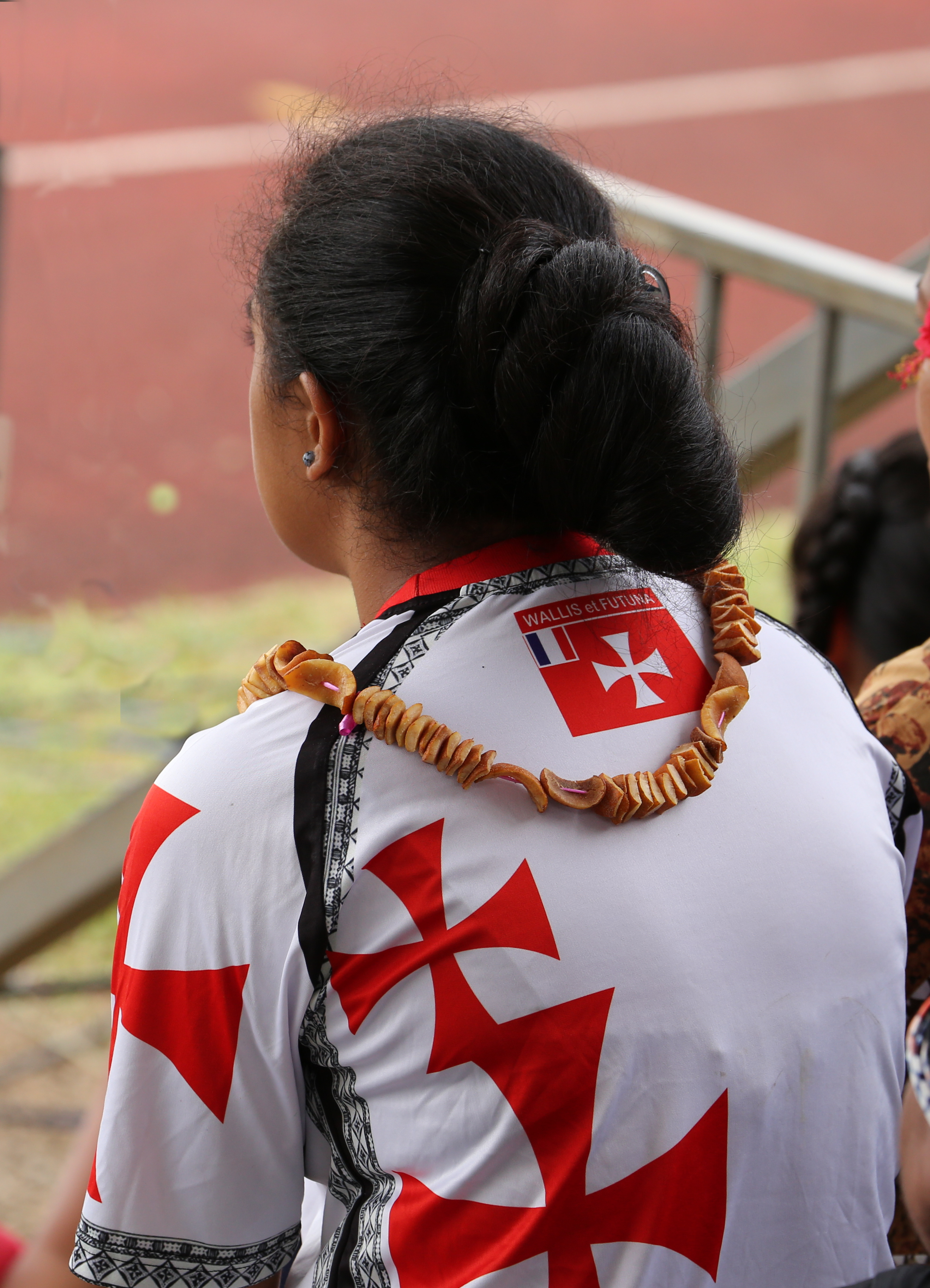 Une sportive arbore fièrement un t-shirt aux couleurs de Wallis lors d'un tournoi international de Rugby.